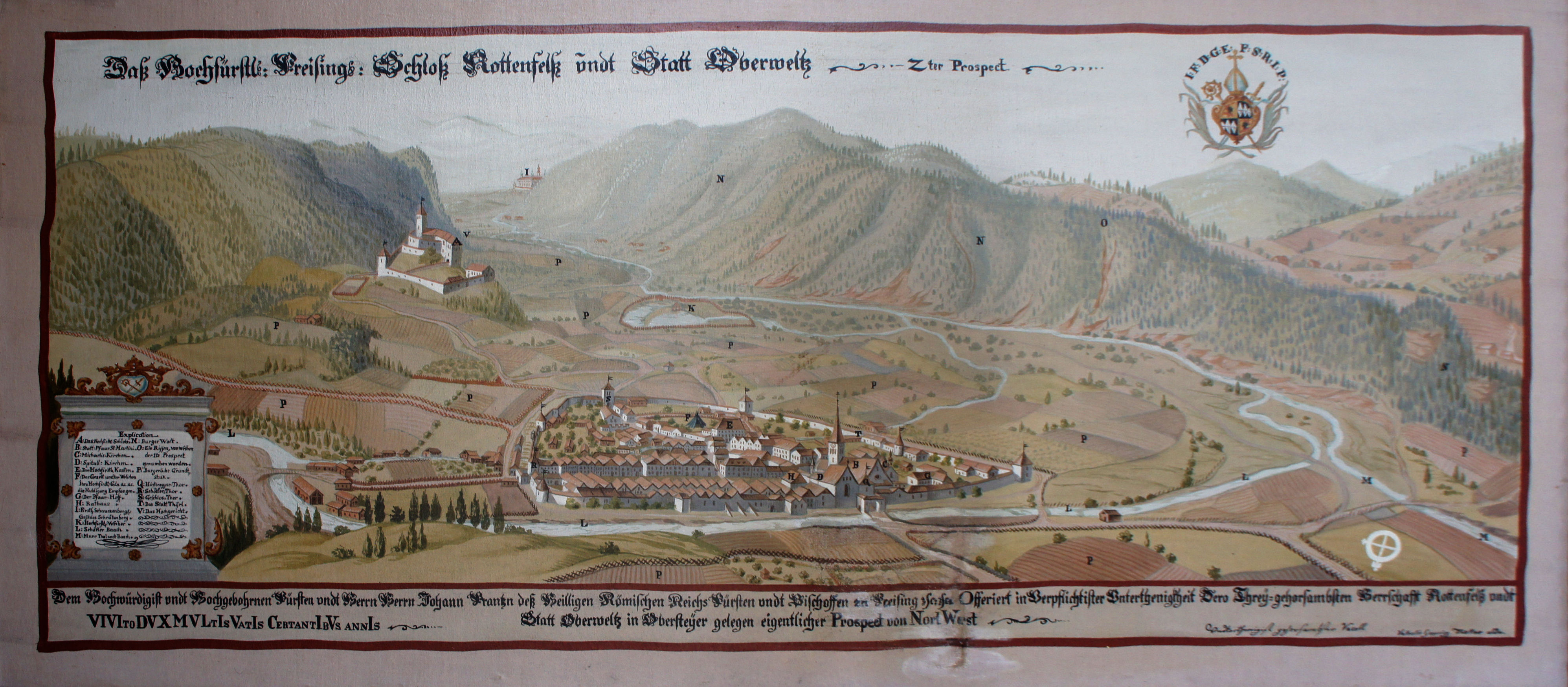 Gemälde aus einer Serie mit Darstellungen von Besitztümern des Hochstifts Freising im Fürstengang zwischen Fürstbischöflicher Residenz und Freisinger Dom.